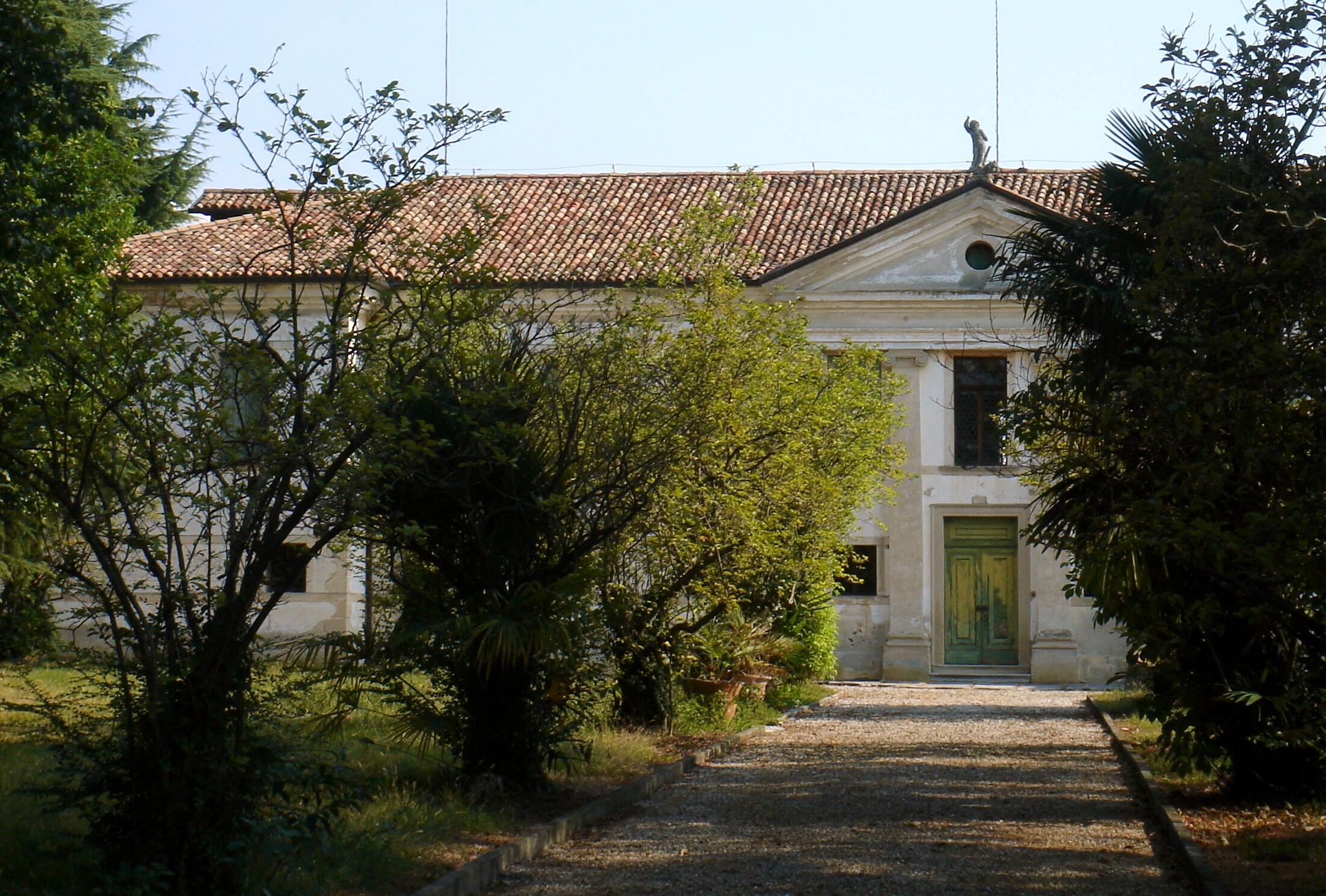 Monticella di Conegliano (Treviso): Villa Morpurgo Pini (XVII secolo).